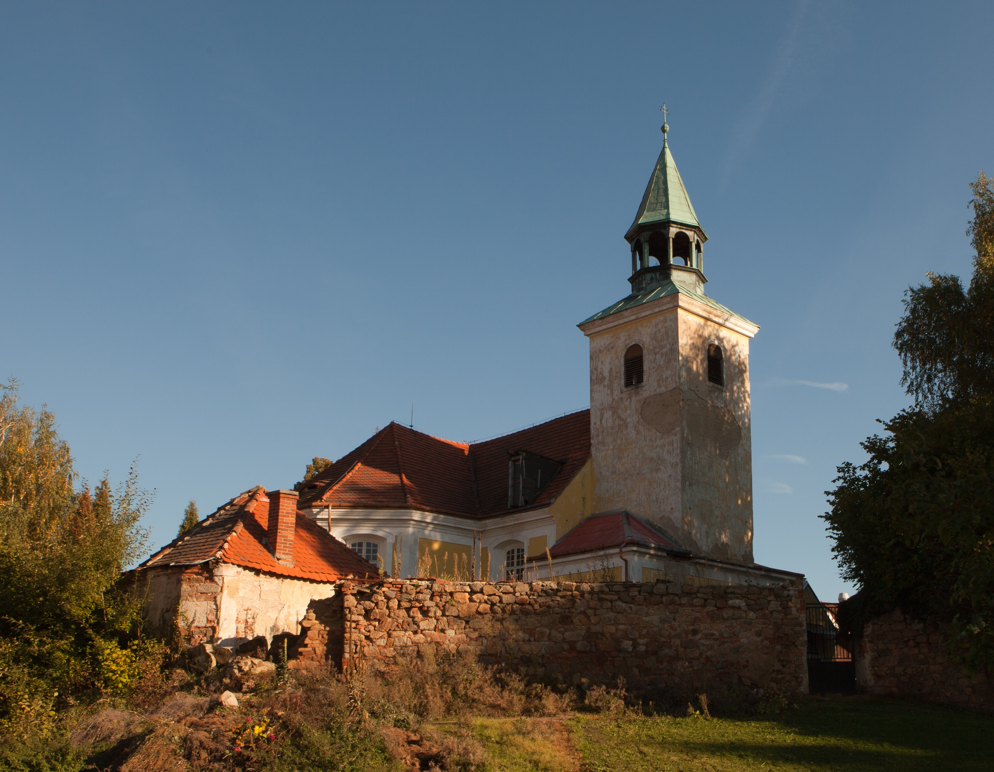 Kostel sv. Petra a Pavla (Jesenice), SZ část vsi, Jesenice